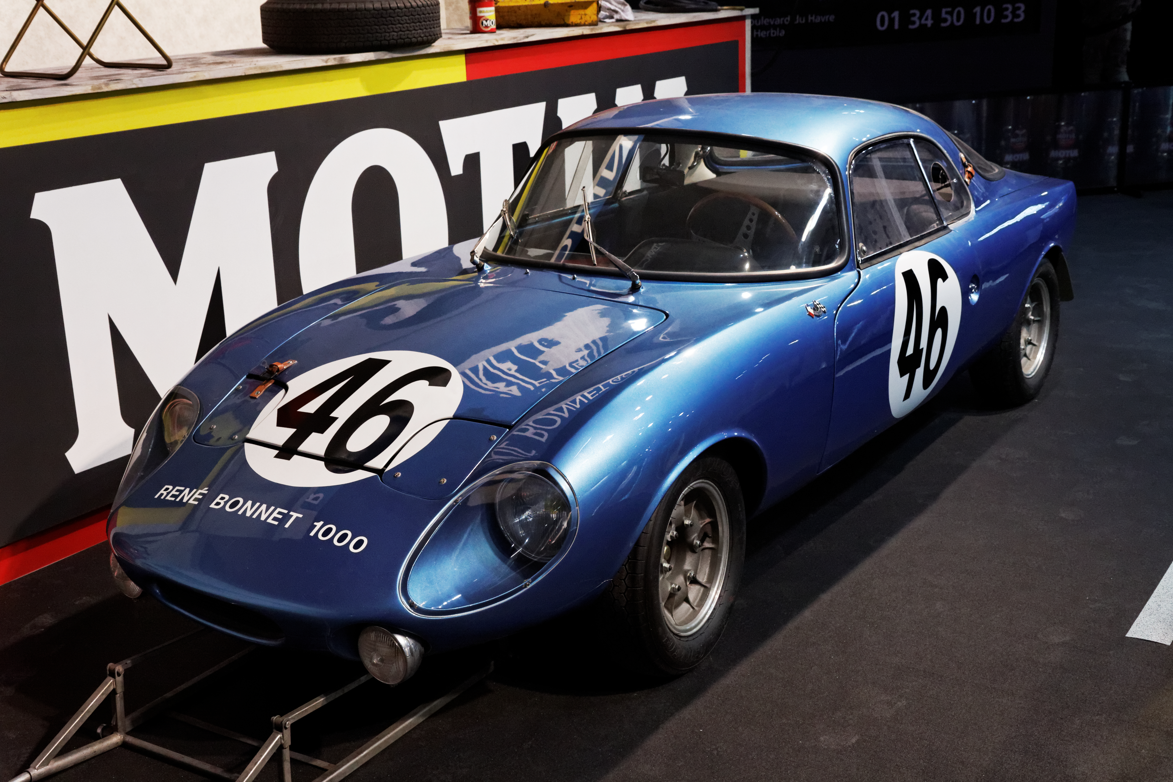 Une René Bonnet 1000 (Djet III) présentée lors du salon Retromobile 2013.